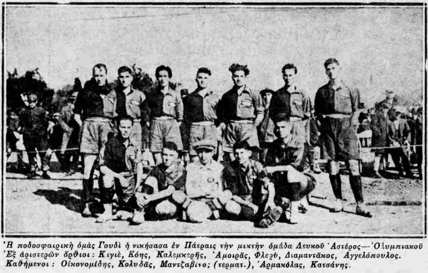 Η ομάδα του Γουδί το 1926